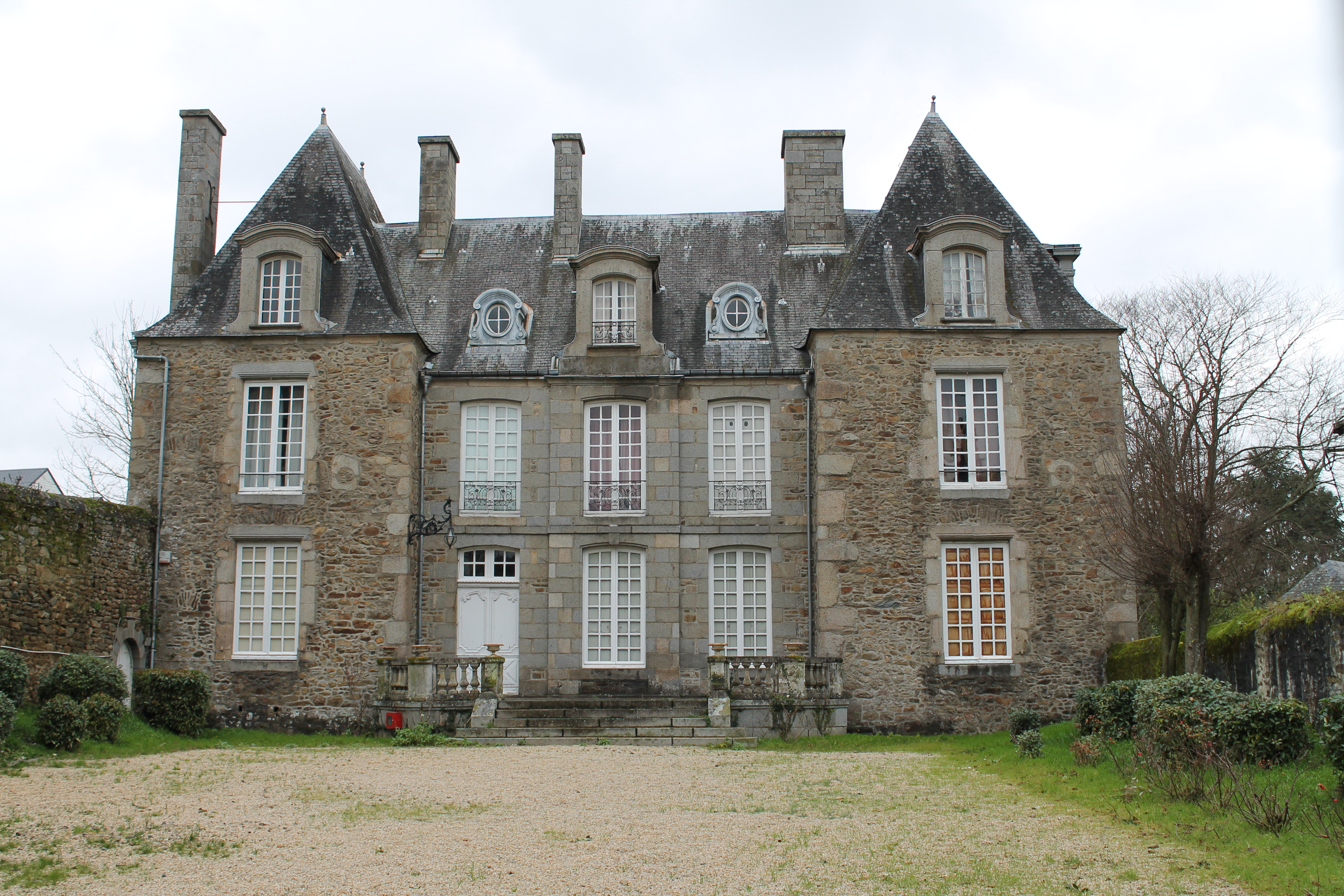 L'Hôtel Montpinçon à Mayenne.